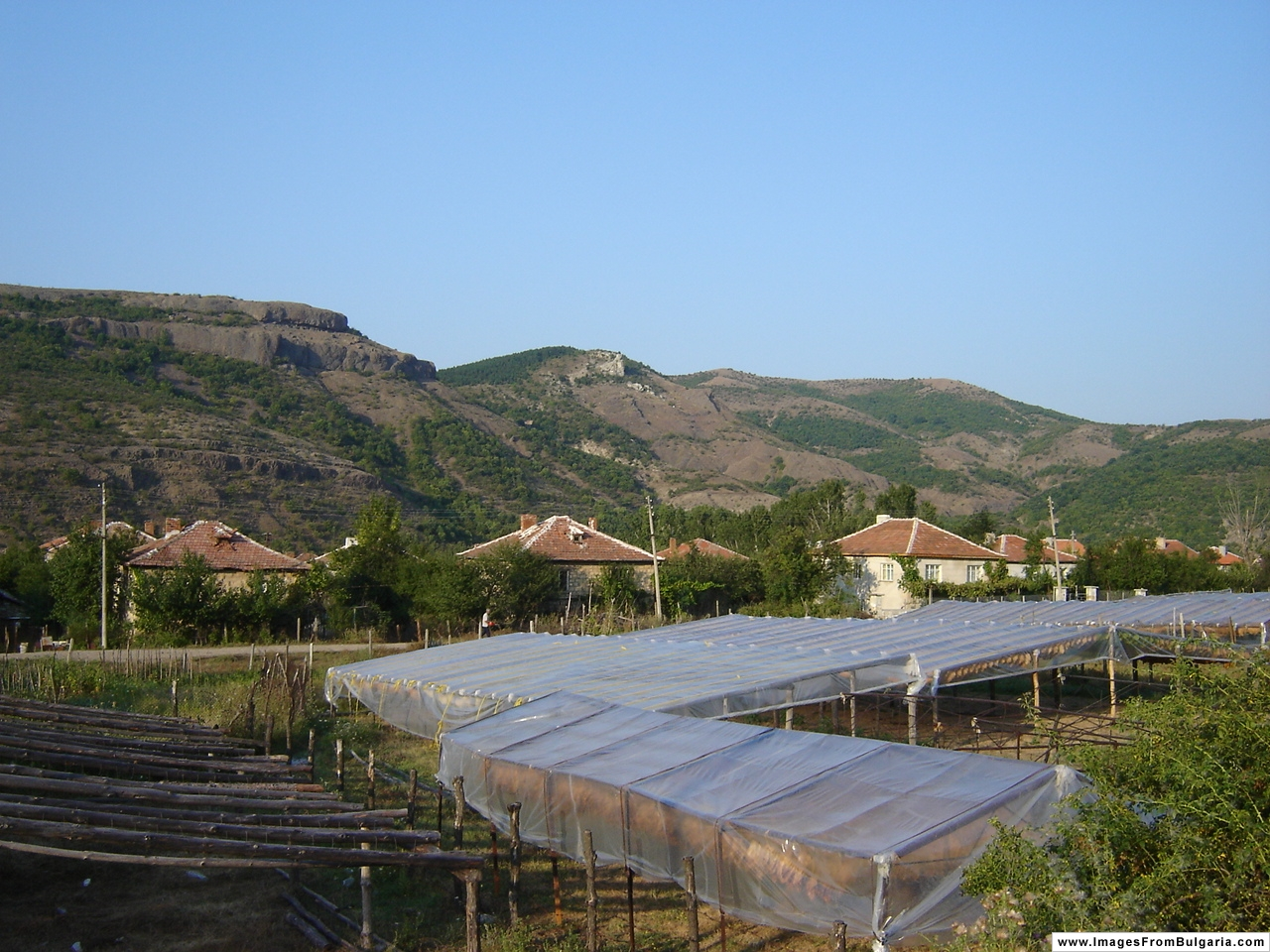 Gorna kula view